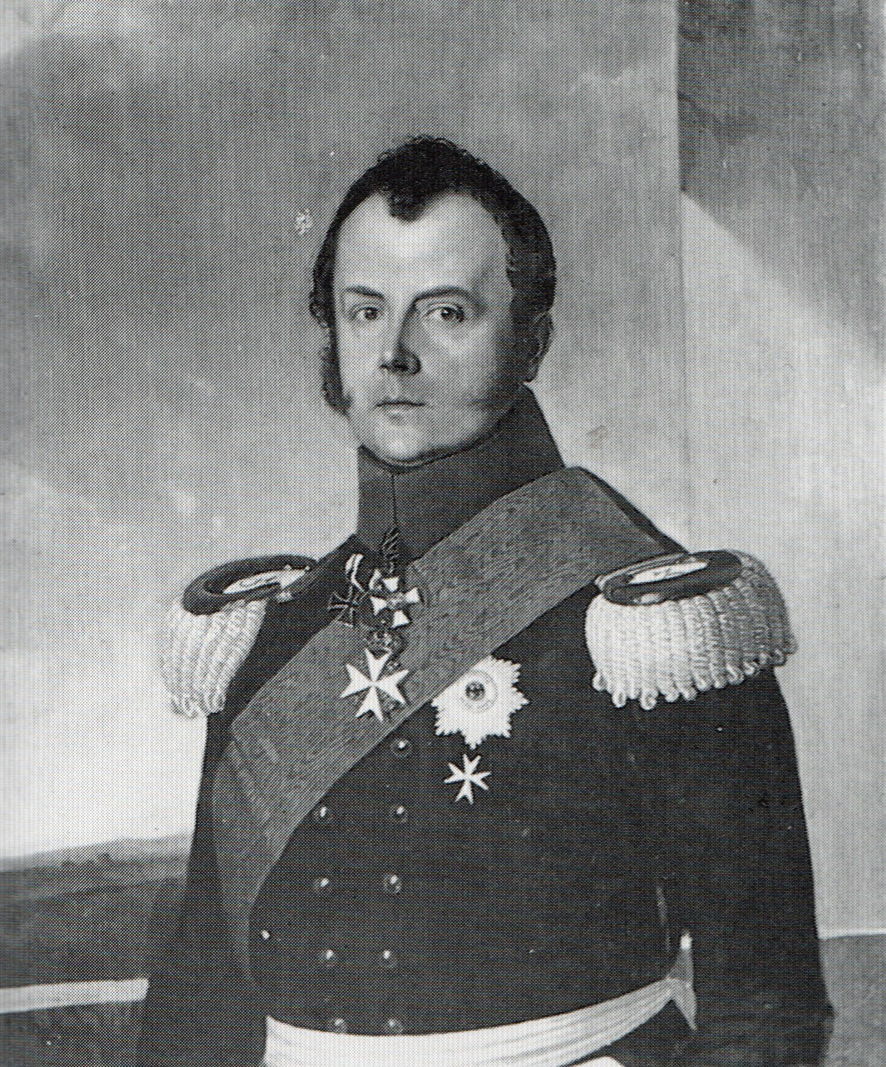 Ölgemälde von Prinz Heinrich von Preußen, früher im Hohenzollernmuseum Schloss Monbijou.